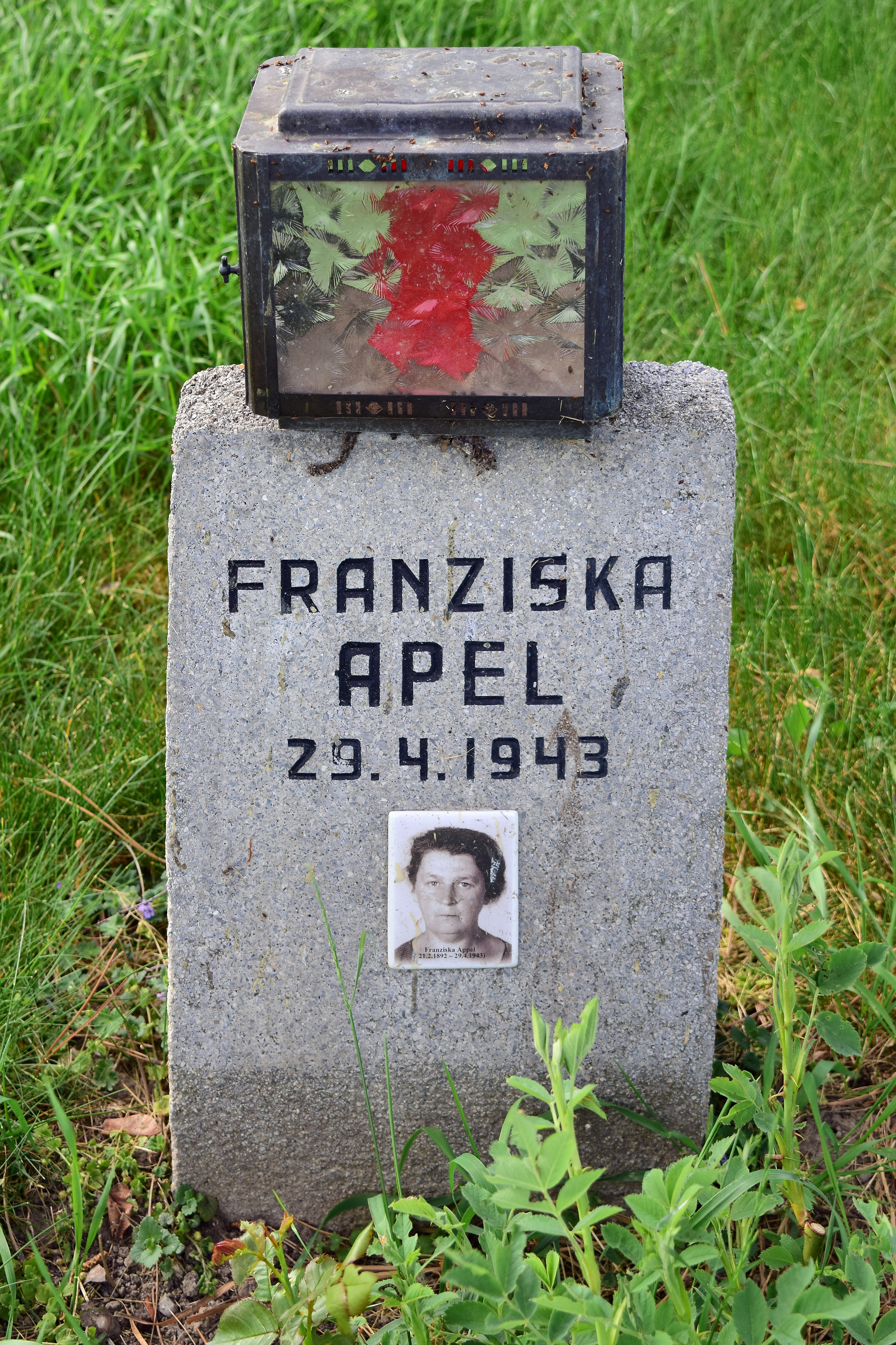 Bestattungs- und Gedenkstätte für die Opfer der NS-Justiz auf dem Wiener Zentralfriedhof